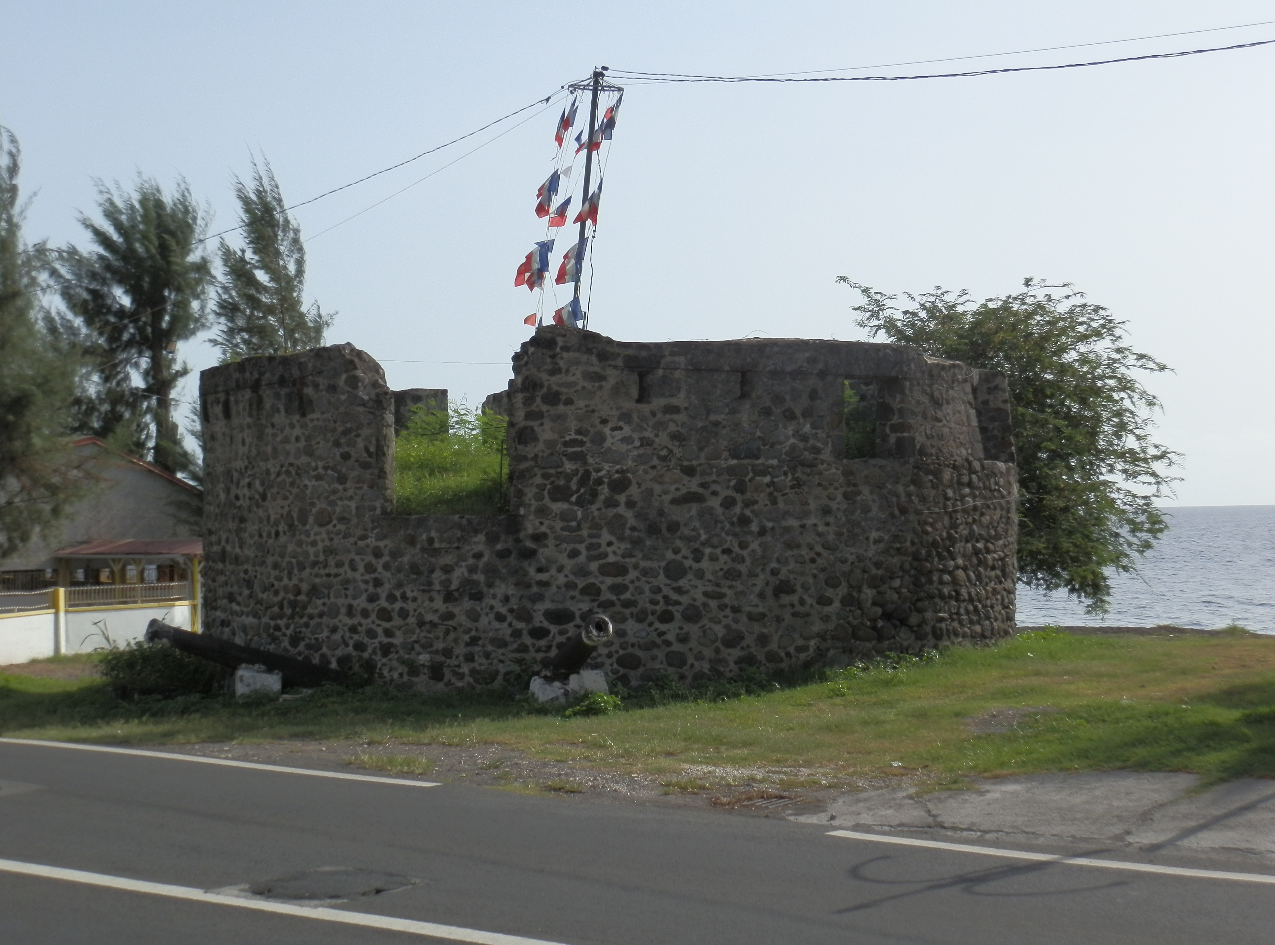 Tour du Père-Labat, (Inscrit, 1979) .